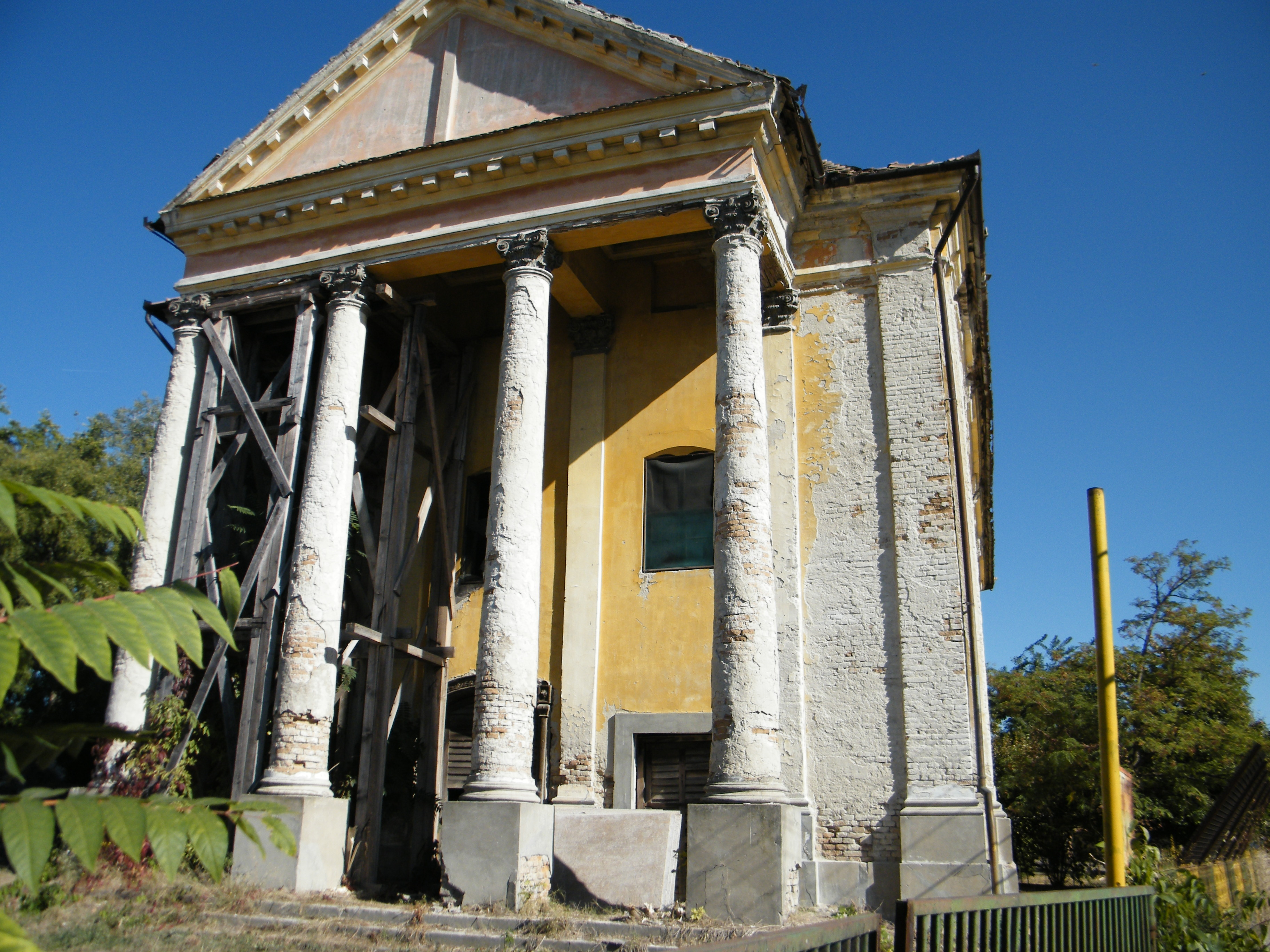 Zsinagóga (Abony, Deák Ferenc utca 4.)